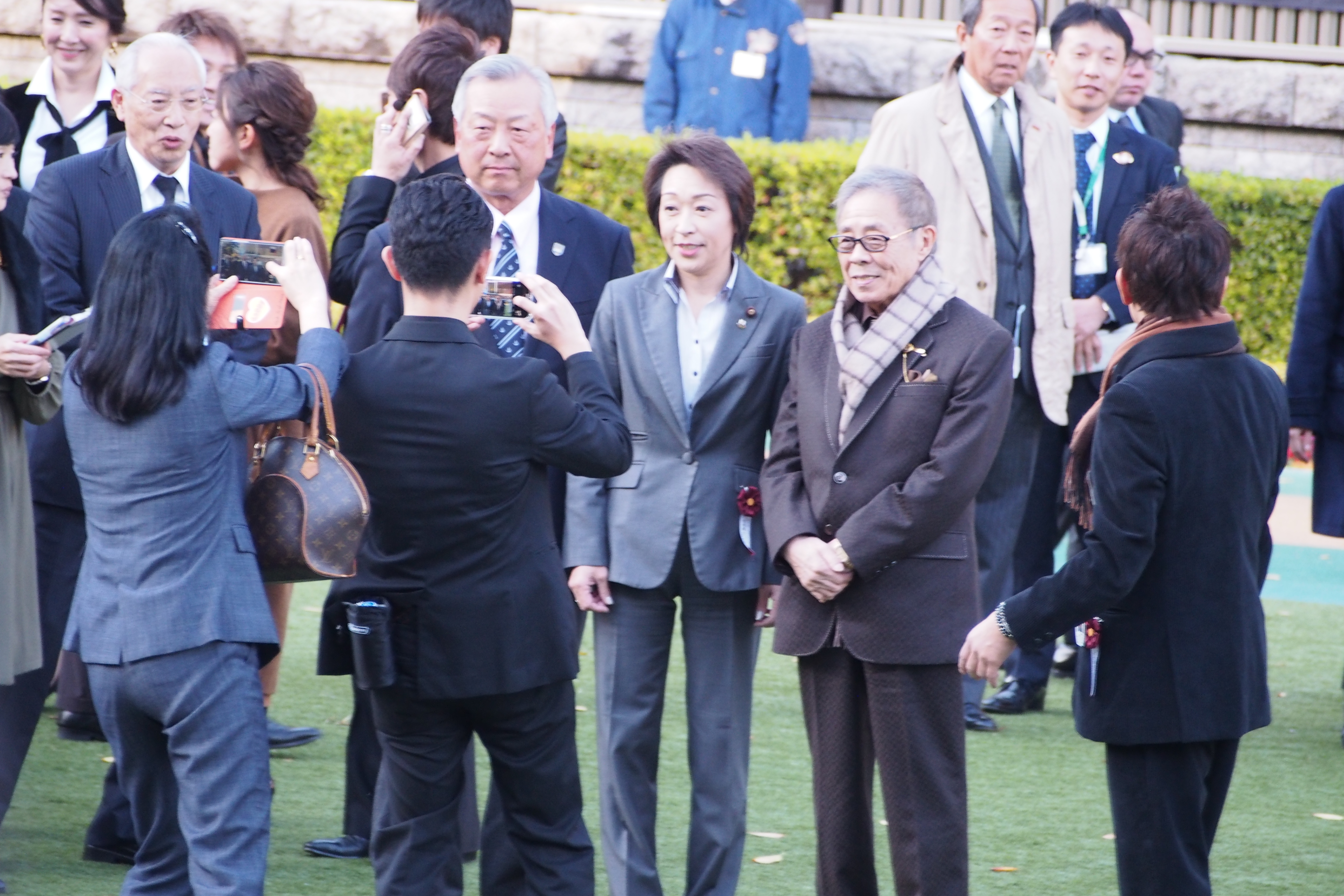 Japan Cup paddock